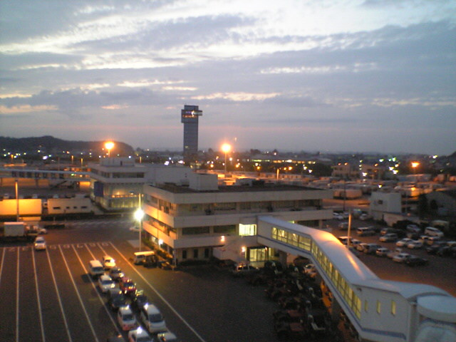 投稿者撮影